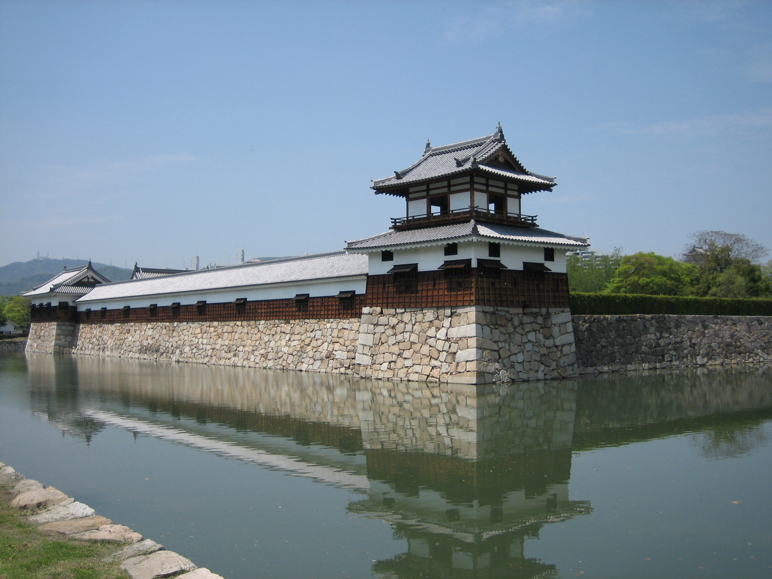 rebuilt Taiko-yagura, Tamon-yagura and Hira-yagura